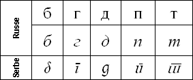 Comparaison des graphies italiques cursives du cyrillique et du serbe / macédonien